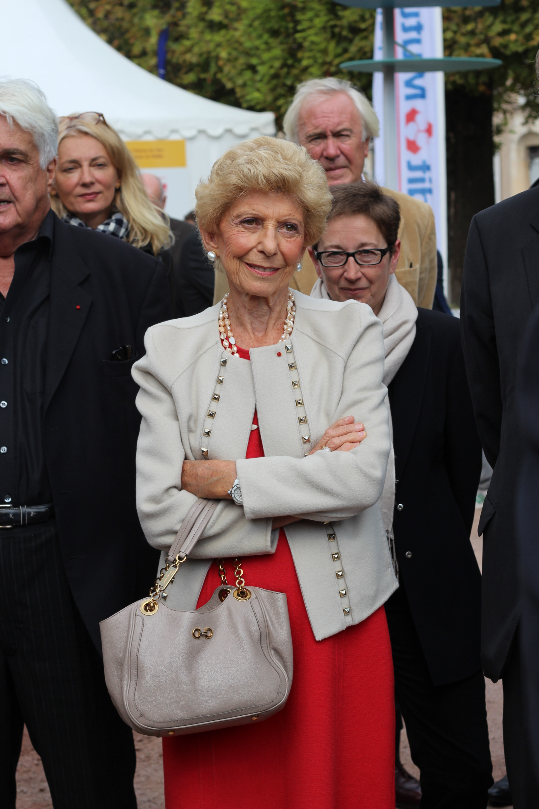 Au Livre sur la Place de Nancy, en septembre 2013.